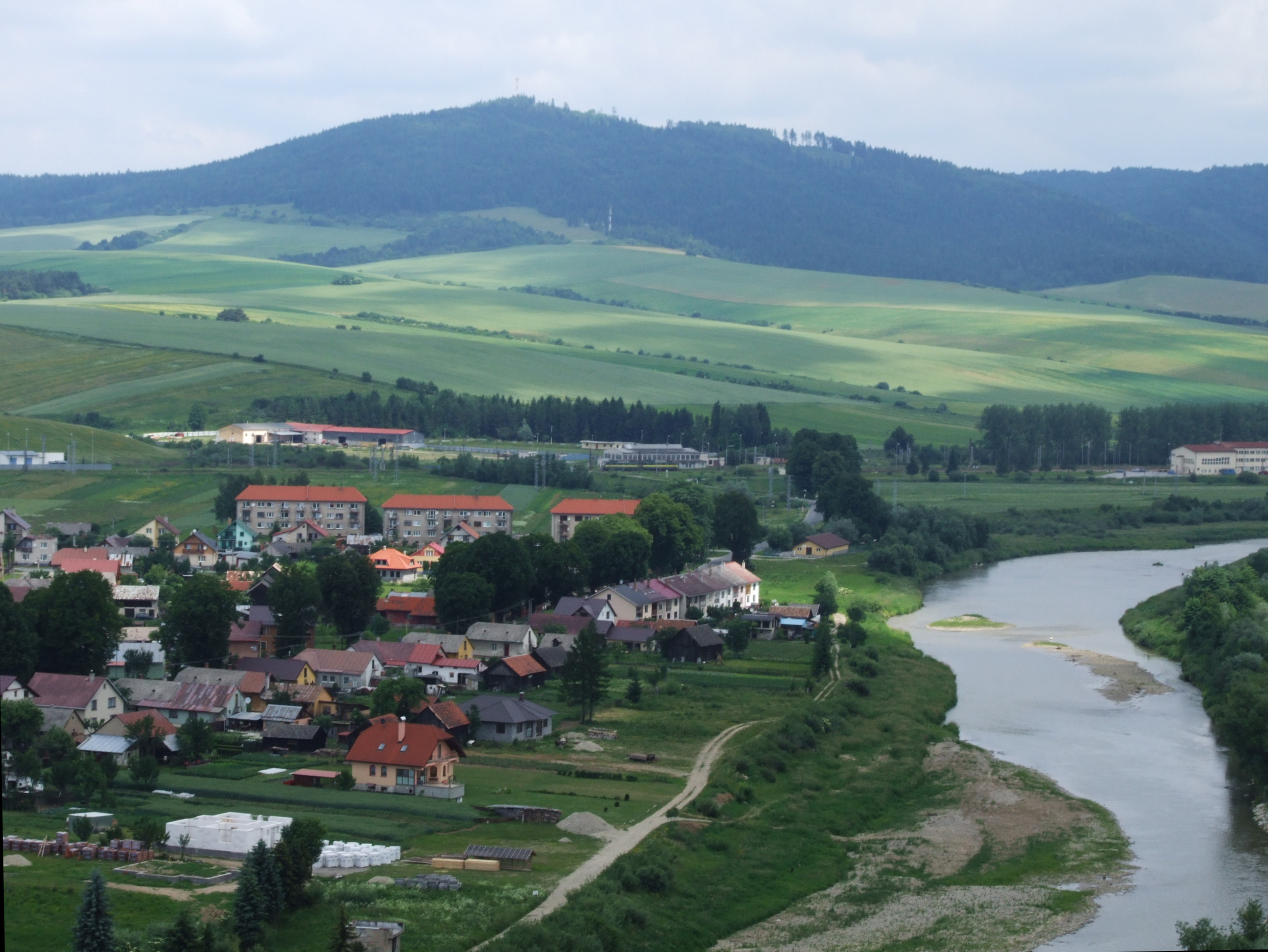 Widok z Zamku w Pławcu na Orłowską Magurę